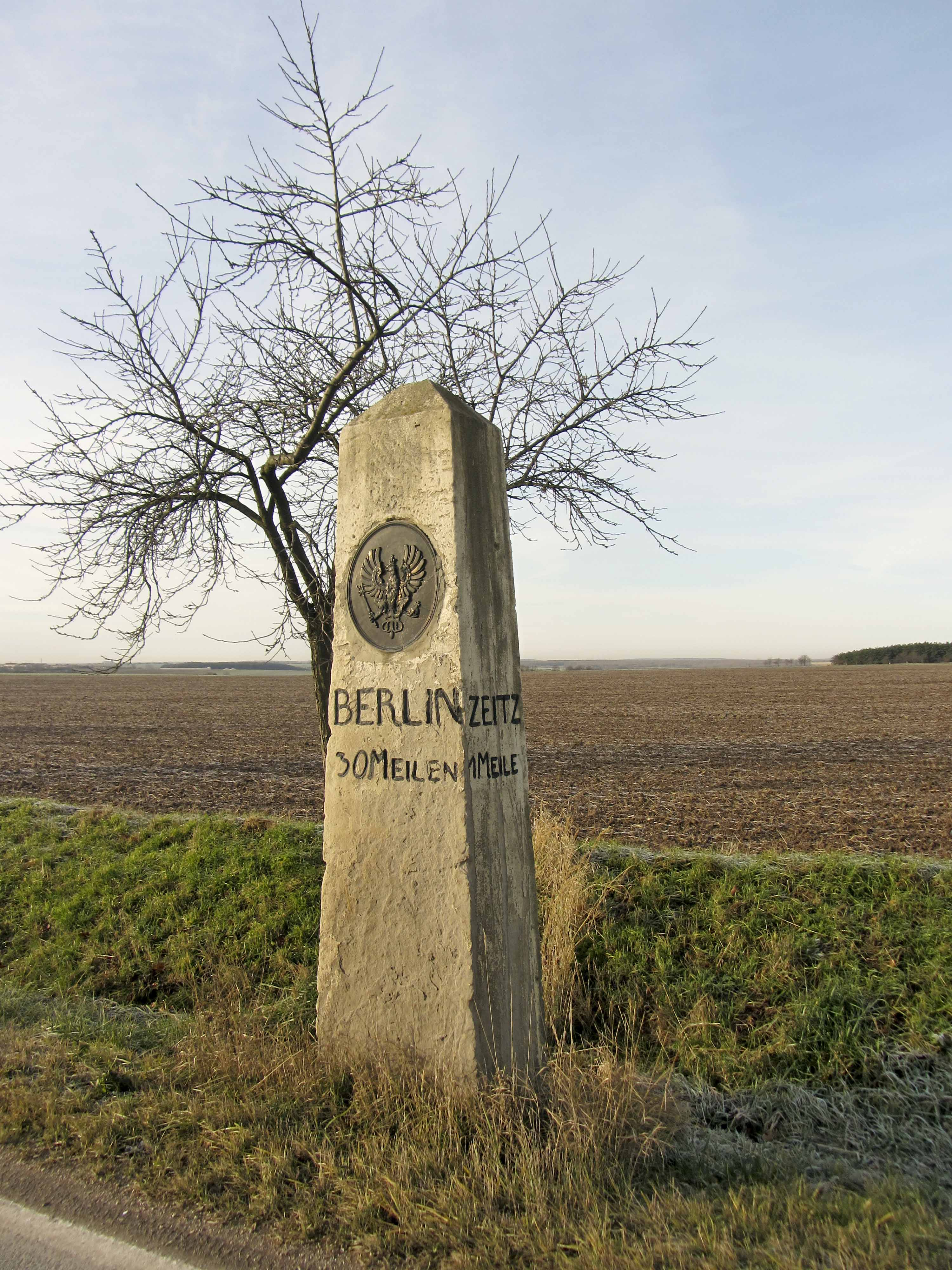 Preußischer Ganzmeilenobelisk an der B 2 Höhe Loitzschütz (Schellbach)